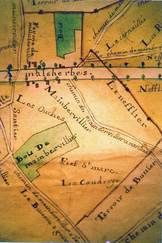 Extrait du plan de seigneurie de Boissy aux Cailles Zone de Mainbervilliers